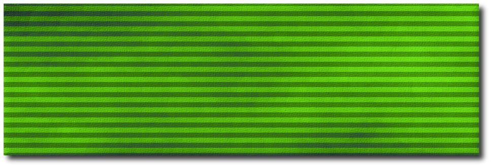 Ruotsin Waasa ritarikunnan 1. lk. komentajamerkkin kunniamerkkinauha